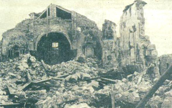 Bazilika Marijinega vnebovzetja na Sveti gori po italijanskem obstraljevanju.